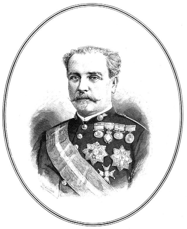 Retrato de Manuel Cassola y Fernández, recogido en la revista española La Ilustración Española y Americana.